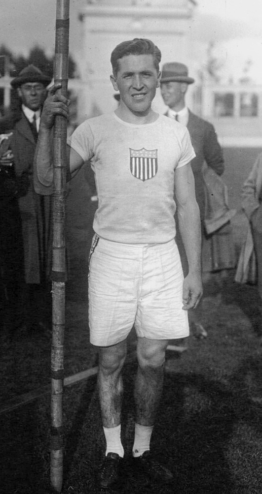 VIIes Olympiades à Anvers : Foss Franck, recordman du monde du saut à la perche (portrait) : [photographie de presse] / Agence Meurisse